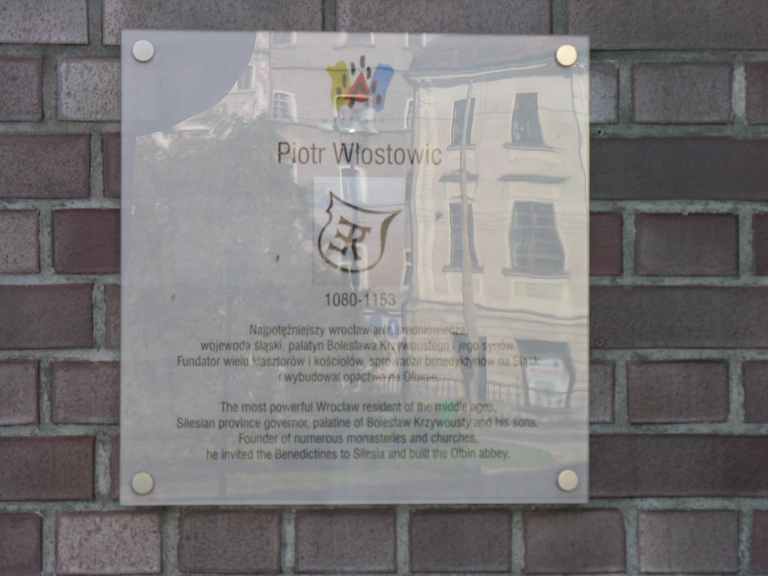 Tablica ku czci Piotra Włosta na kościele NMP na Piasku we Wroćlawiu